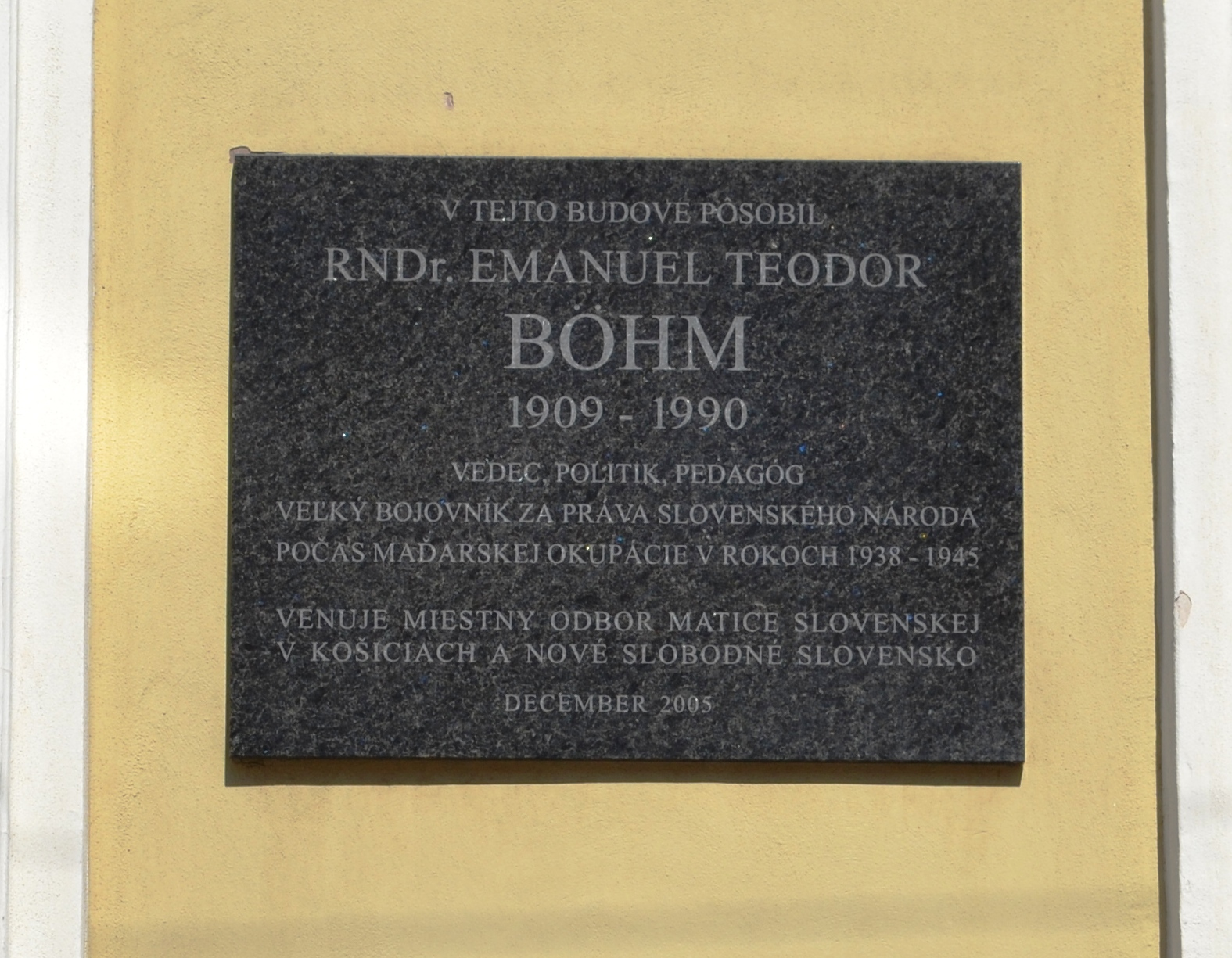 Pamätná tabuľa Emanuela Teodora Böhma na bývalej budove Čs. vyššej reálky – dnes na Gymnáziu, Poštová ulica 9 v Košiciach.